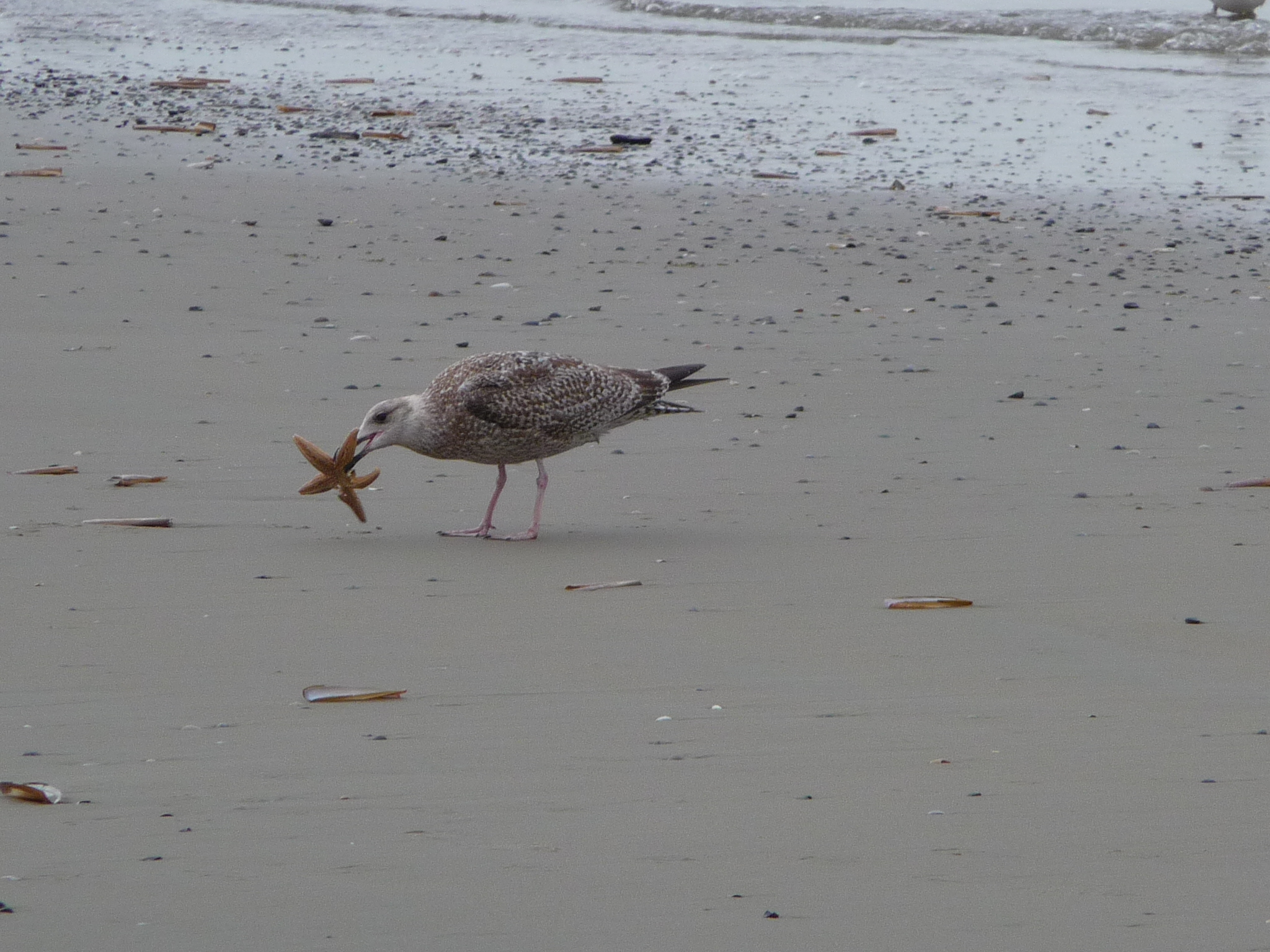 Gemeiner Seestern (Asterias rubens) als Nahrung für eine Jungmöwe (Larus argentatus), fotografiert am Strand der ostfriesischen Nordseeinsel Juist (Niedersachsen, Deutschland)